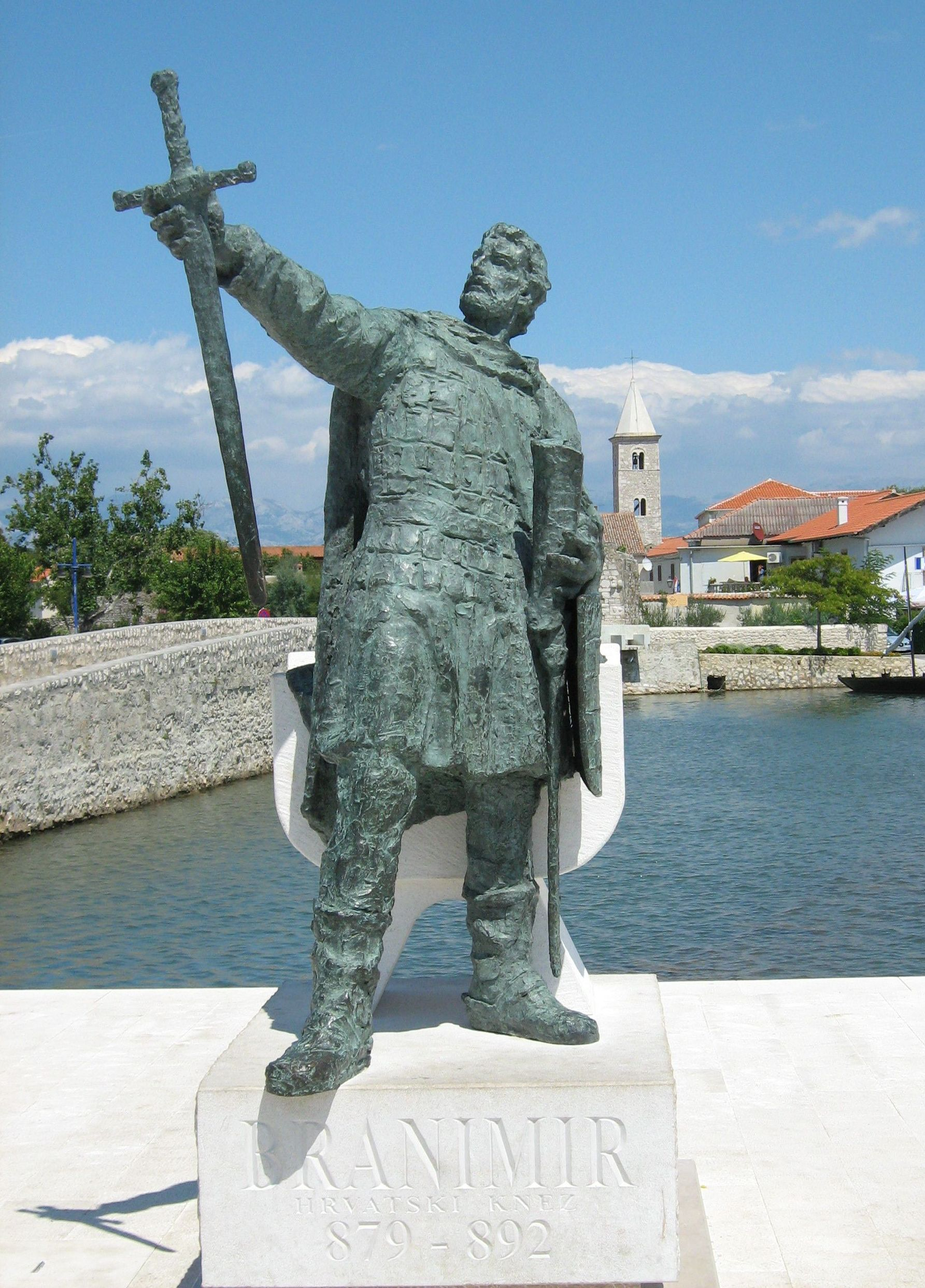 Kip kneza Branimira u Ninu